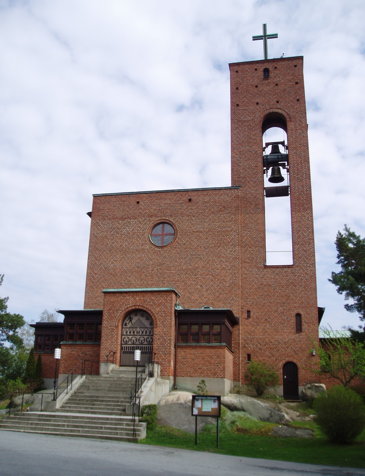 Västerledskyrkan, church in Bromma, Stockholm, Sweden